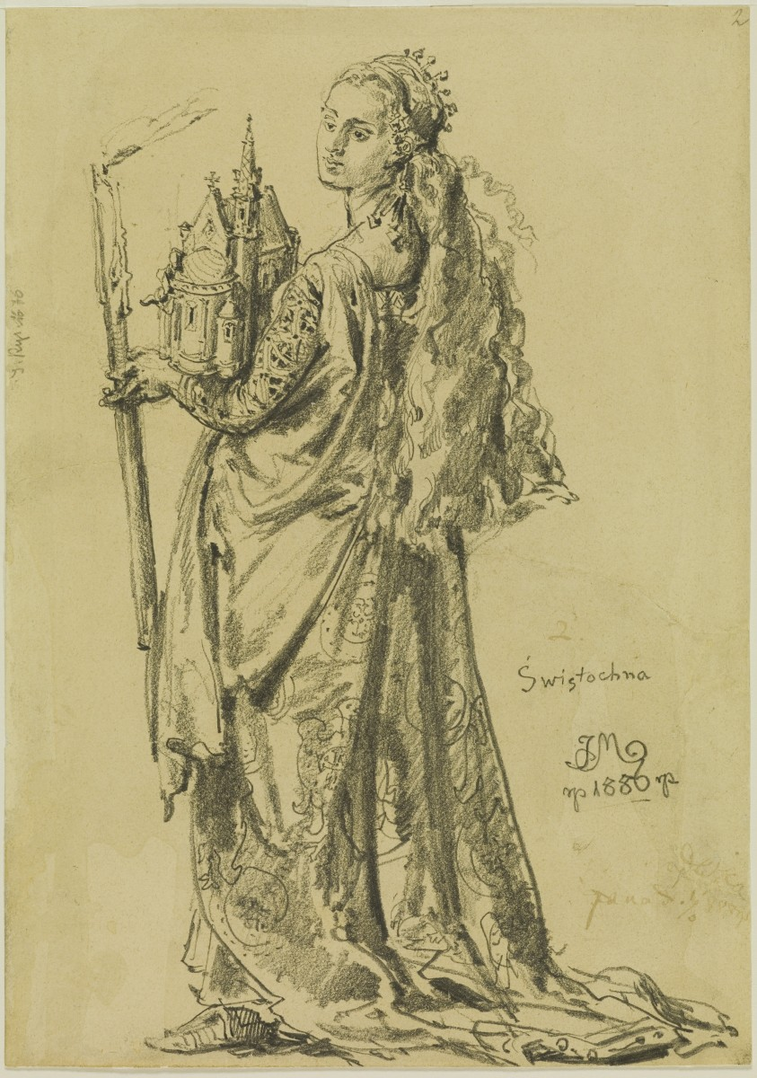 Świętosława Swatawa